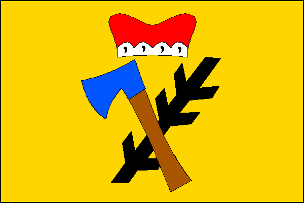 vlajka, Rosička, okres Žďár nad Sázavou